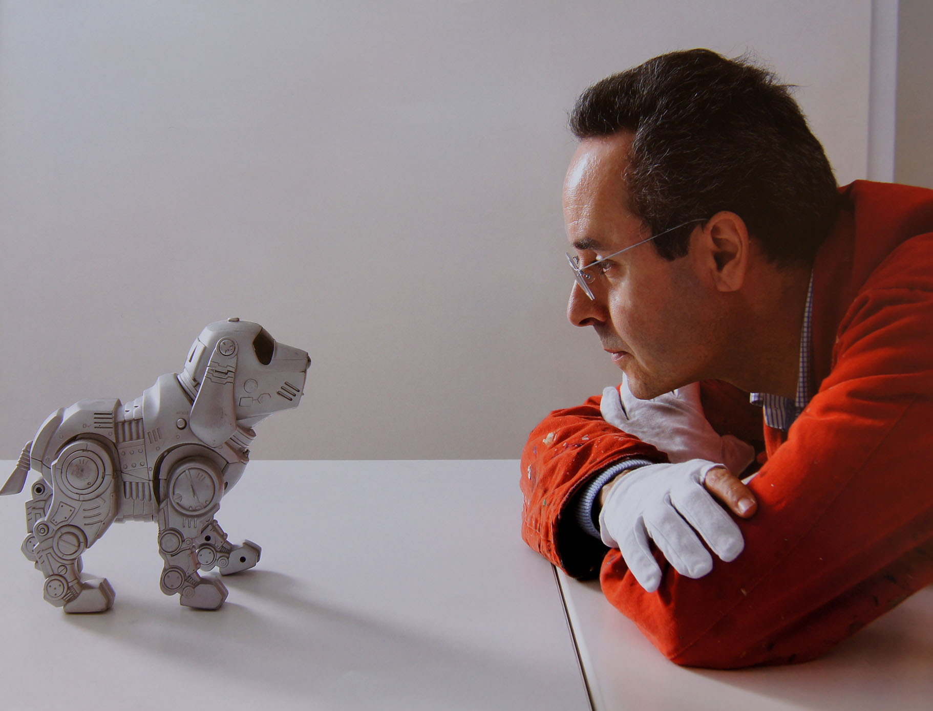 Retrato de Manuel Sáez con motivo de la exposición de dibujos. Sala Parpalló, Valencia, 2008